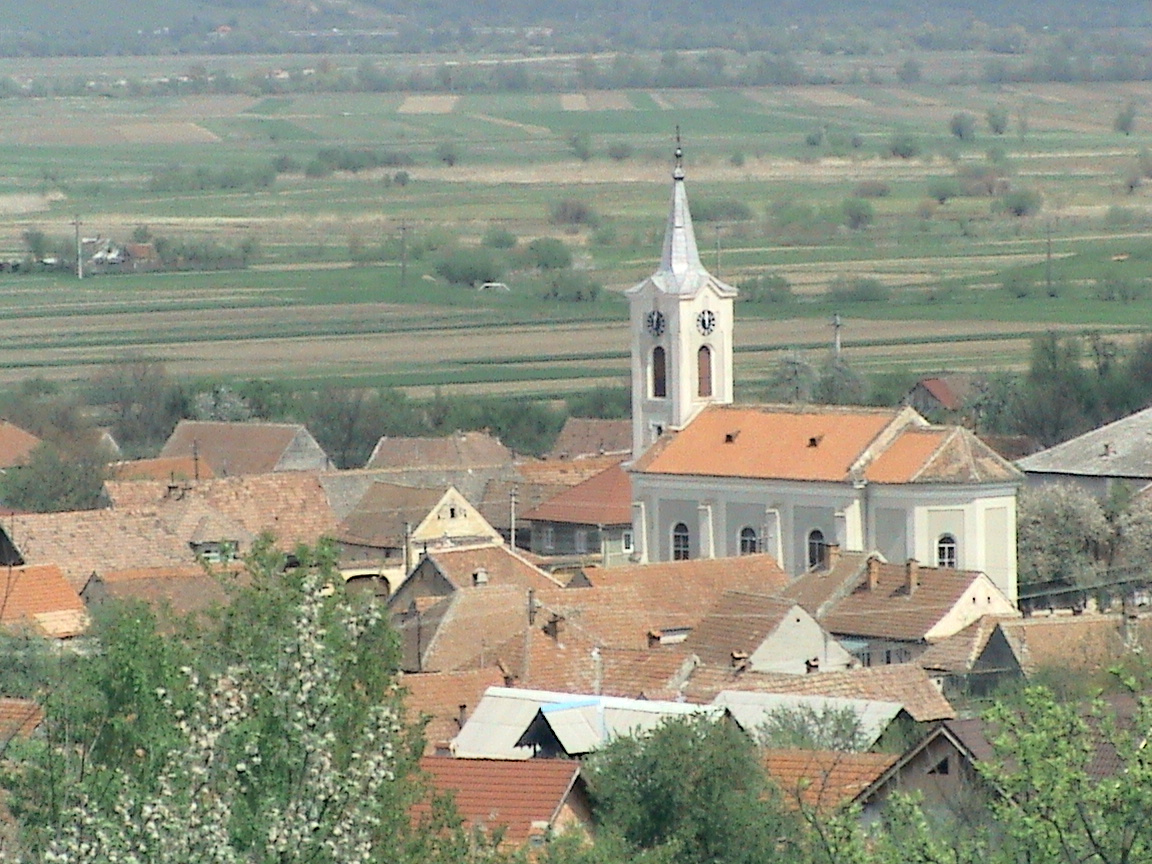 Satul Racovița și biserica, fotografie făcută "Din Deal".